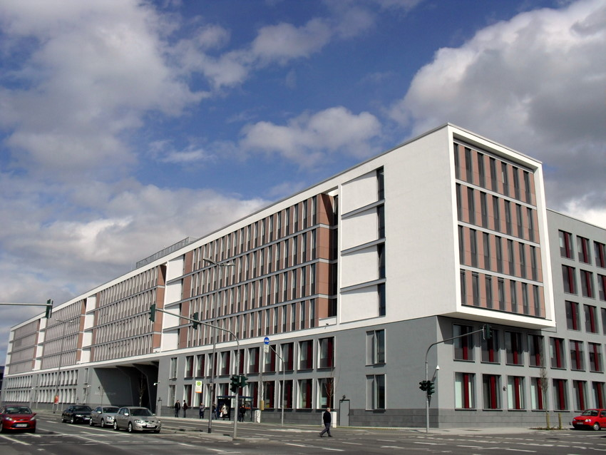 Gericht Wiesbaden